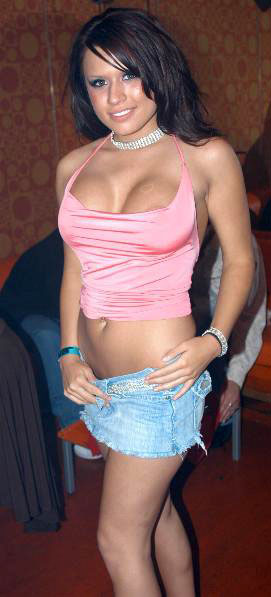 Eva Angelina